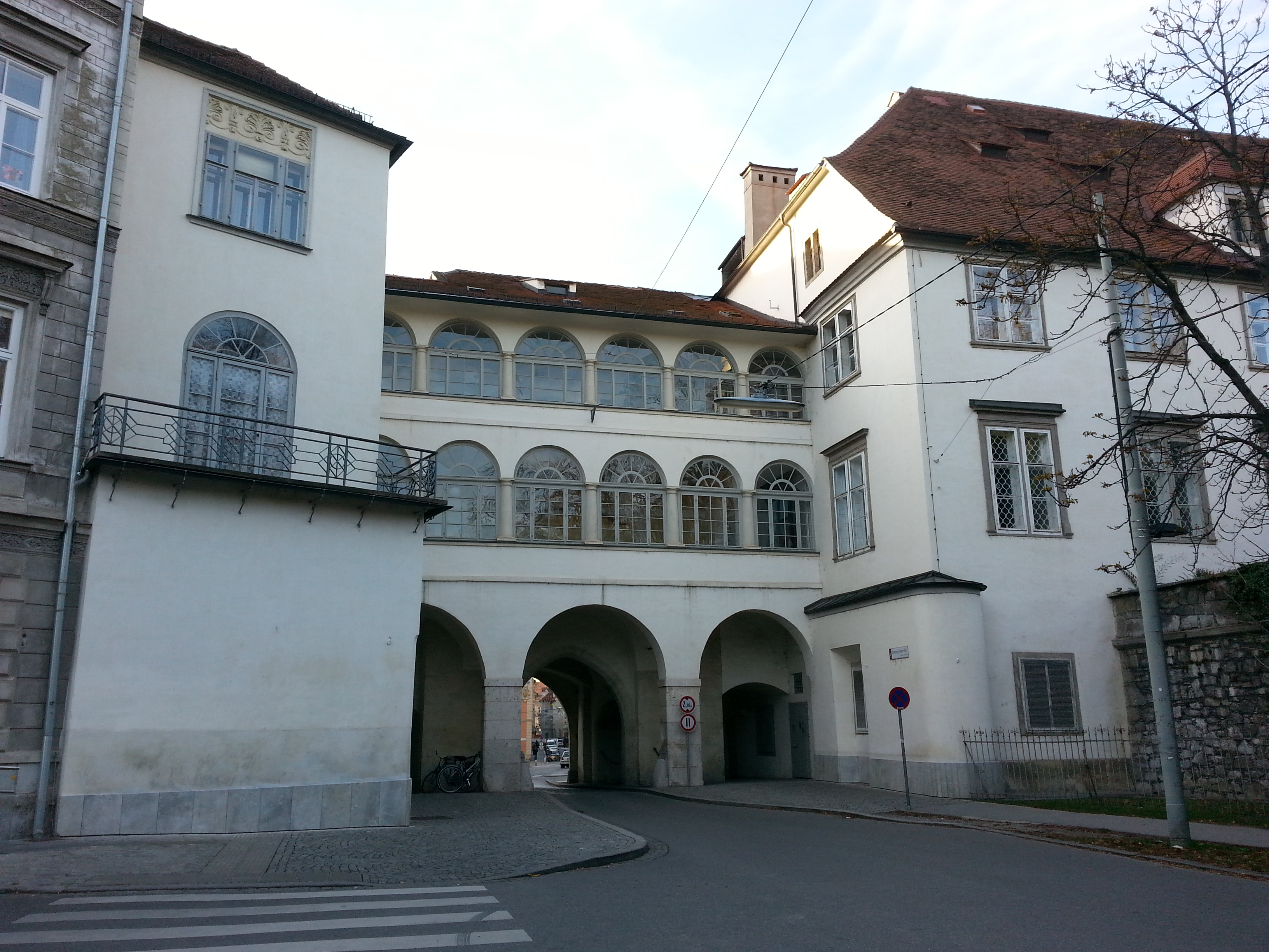 Das Burgtor in Graz vom Stadtpark aus gesehen